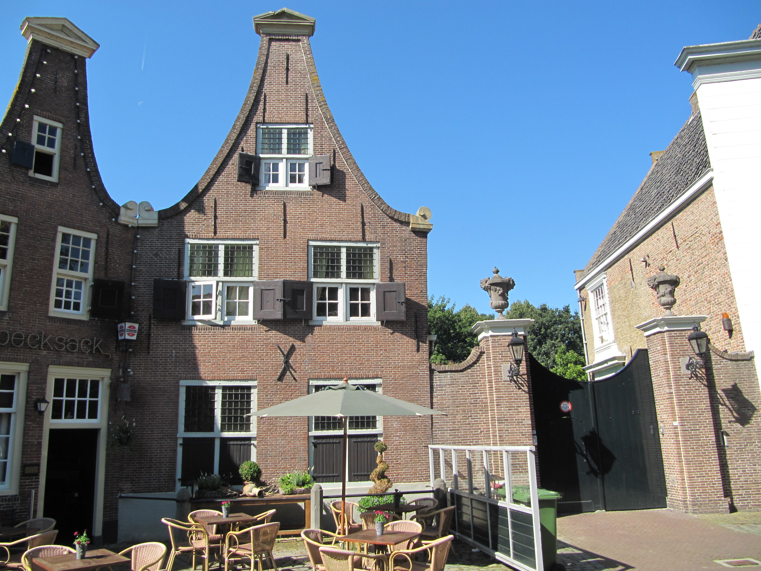 RM9391 Heenvliet - Markt 10.jpg